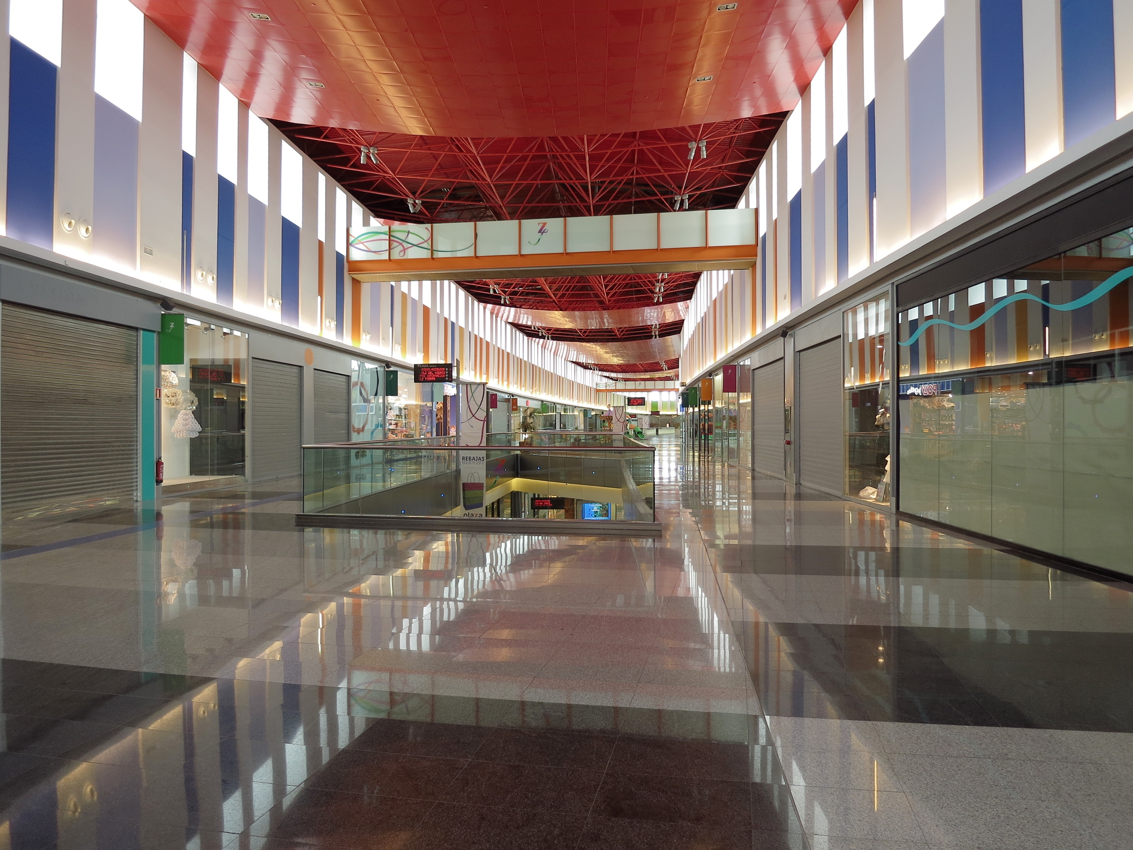 Zaragoza (Aragón, España) - Interior del Centro Comercial Plaza Imperial.